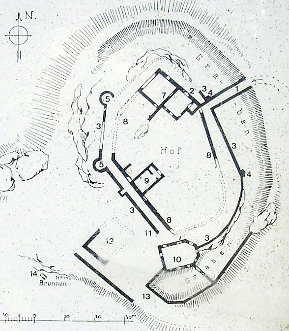 Burg Rauheneck (Raueneck) bei Ebern (Unterfranken) / Rauheneck (Raueneck) castle near Ebern (Lower Franconia, Germany)